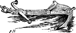 Porters och Trotmans ankare a: klam eller schackel